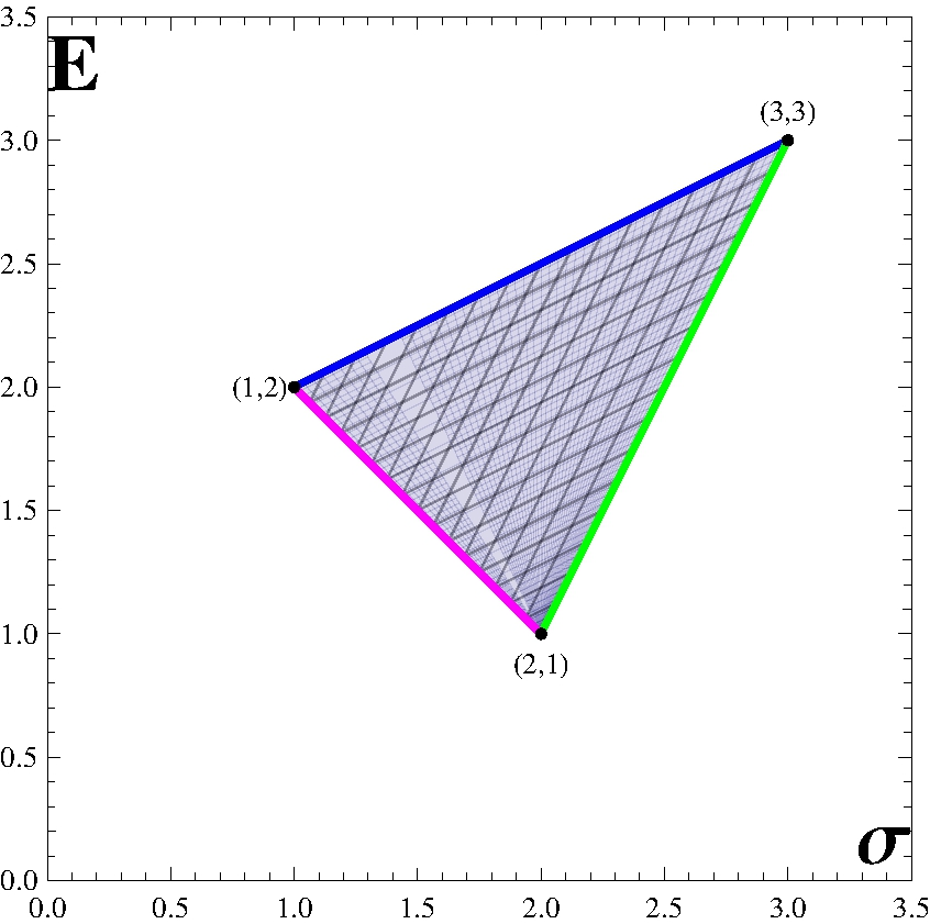 Rysunek do przykładów dla modelu Markowitza